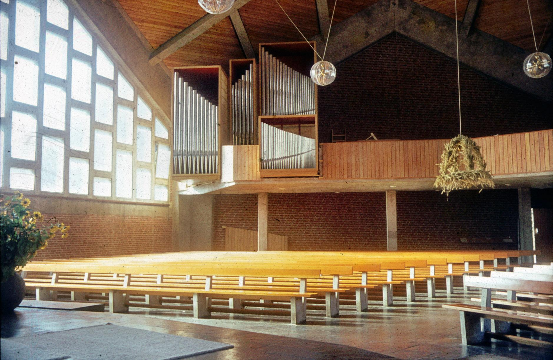 Innenaufnahme mit Orgelprospekt der Corvinuskirche in Hannover-Stöcken 1964.